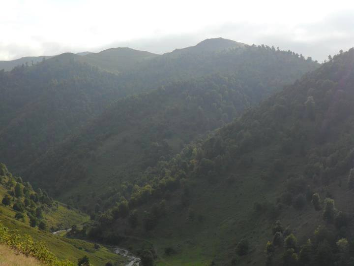 Gədəbəy rayonu Arıqıran kəndi